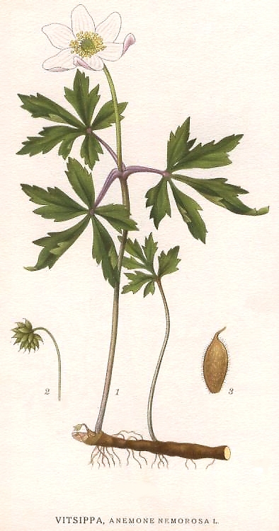 Original Description Vitsippa, Anemone nemorosa L.